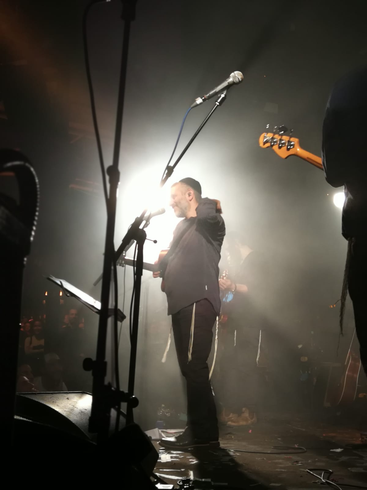 אביתר בנאי בהופעה בבארבי תל אביב 15/11/2018